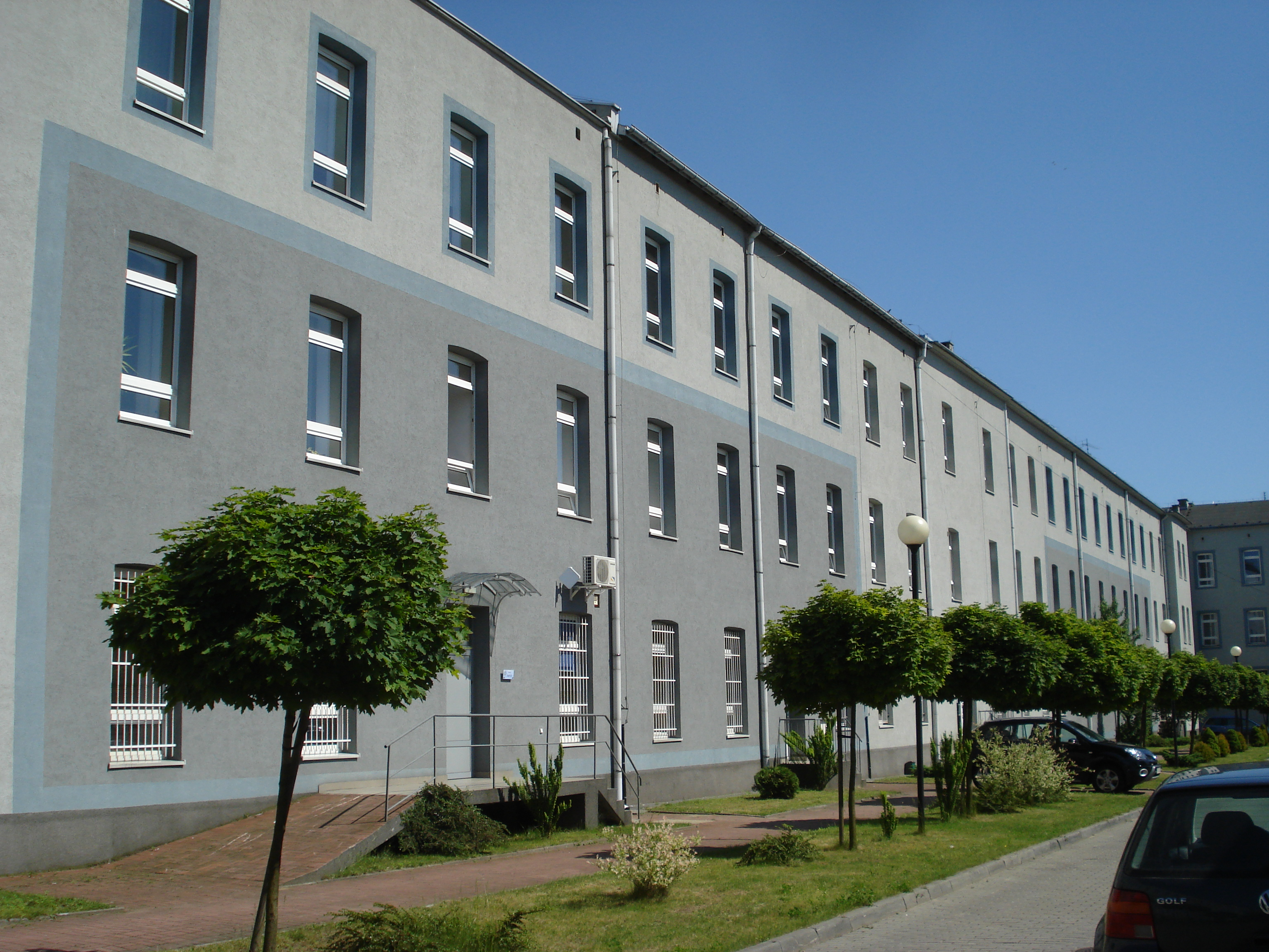 Budynki wydziałowe Politechniki Częstochowskiej